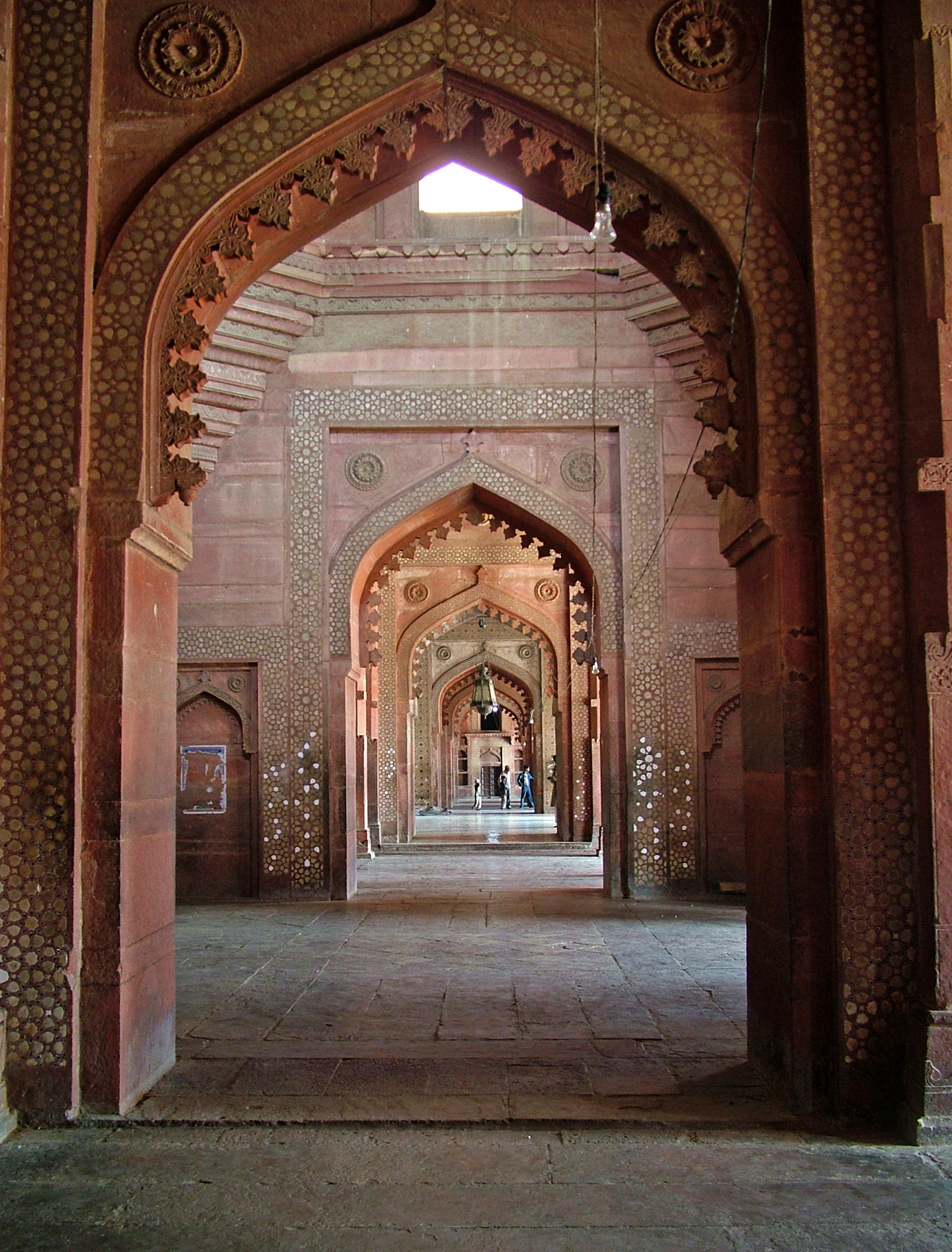 Jama Masjid in Fatehpur Sikri, Agra